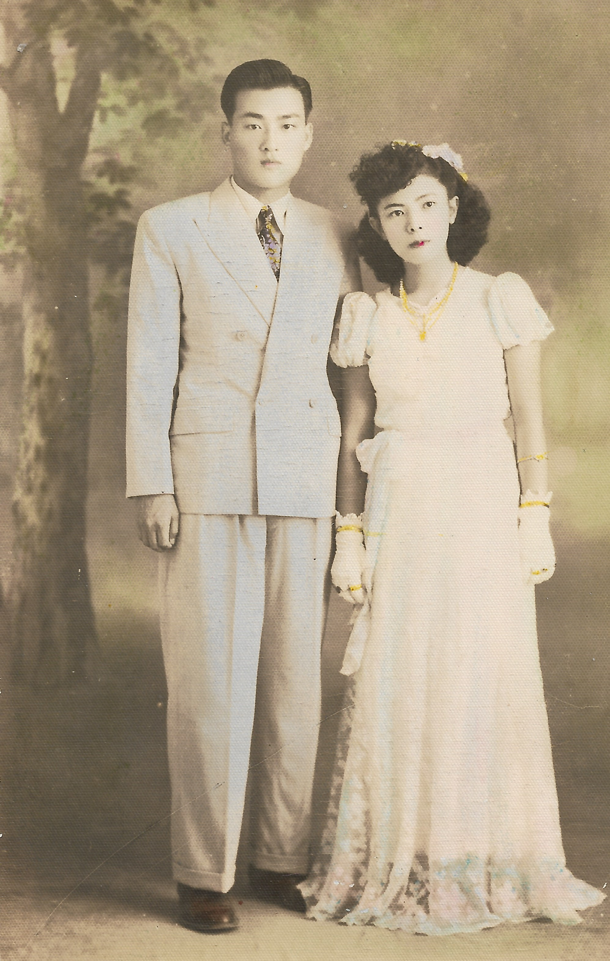 鄭澤雄（左）與妻子劉素珠合照